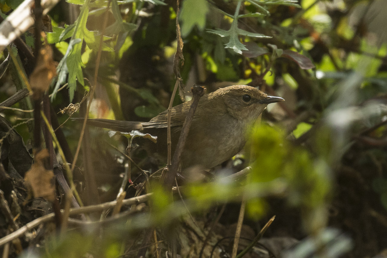 Russet Bush-Warbler - Arunachal Pradesh - India_FJ0A8771